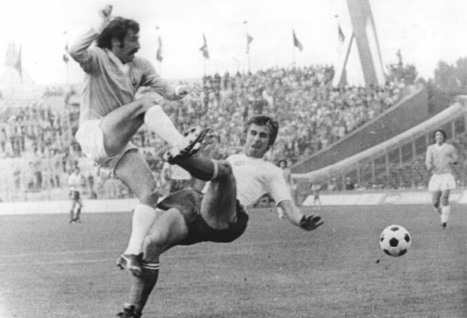 ADN-ZB-AP-Tele-19.6.74-ma-BRD-Hannover: X. Fußball-Weltmeisterschaft-1. Finalrunde, Gruppe 3: Bulgarien - Uruguay 1:1- Im harten Zweikampf um den Ball der Bulgare Asparuch Nikodimow (rechts) und Ricardo Pavoni (Uruguay-links), der den 1:1-Ausgleichsteffer später erzielte.